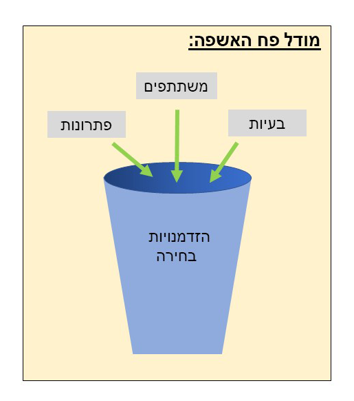 תיאור של מודל פח האשפה